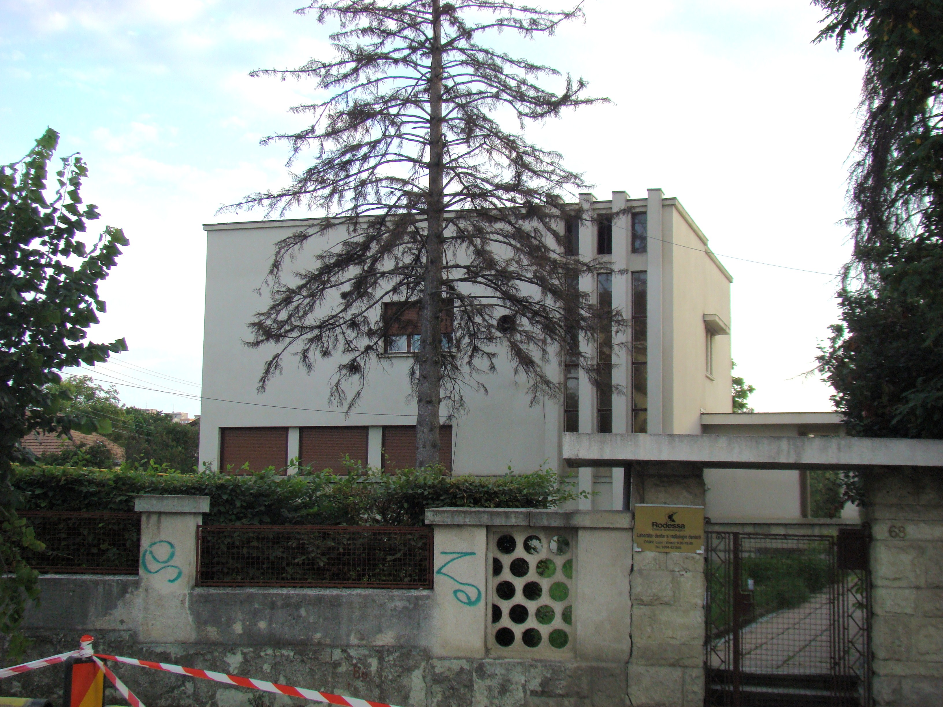 Clădire monument istoric, str.Republicii, nr.68